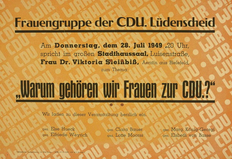 Ankündigungsplakat einer Veranstaltung mit Viktoria Steinbiß, Christlich Demokratische Union Deutschlands